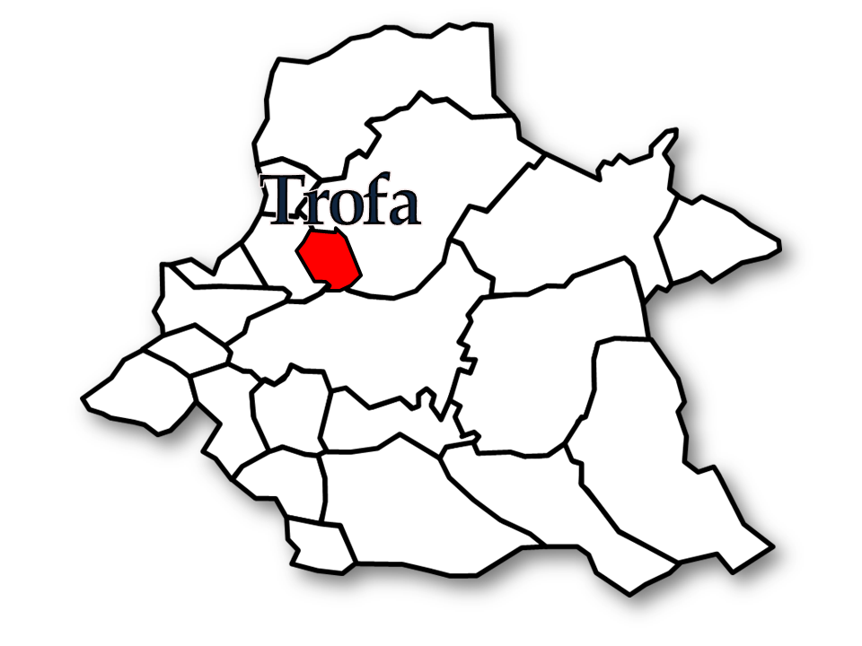 Censos 1864/2011